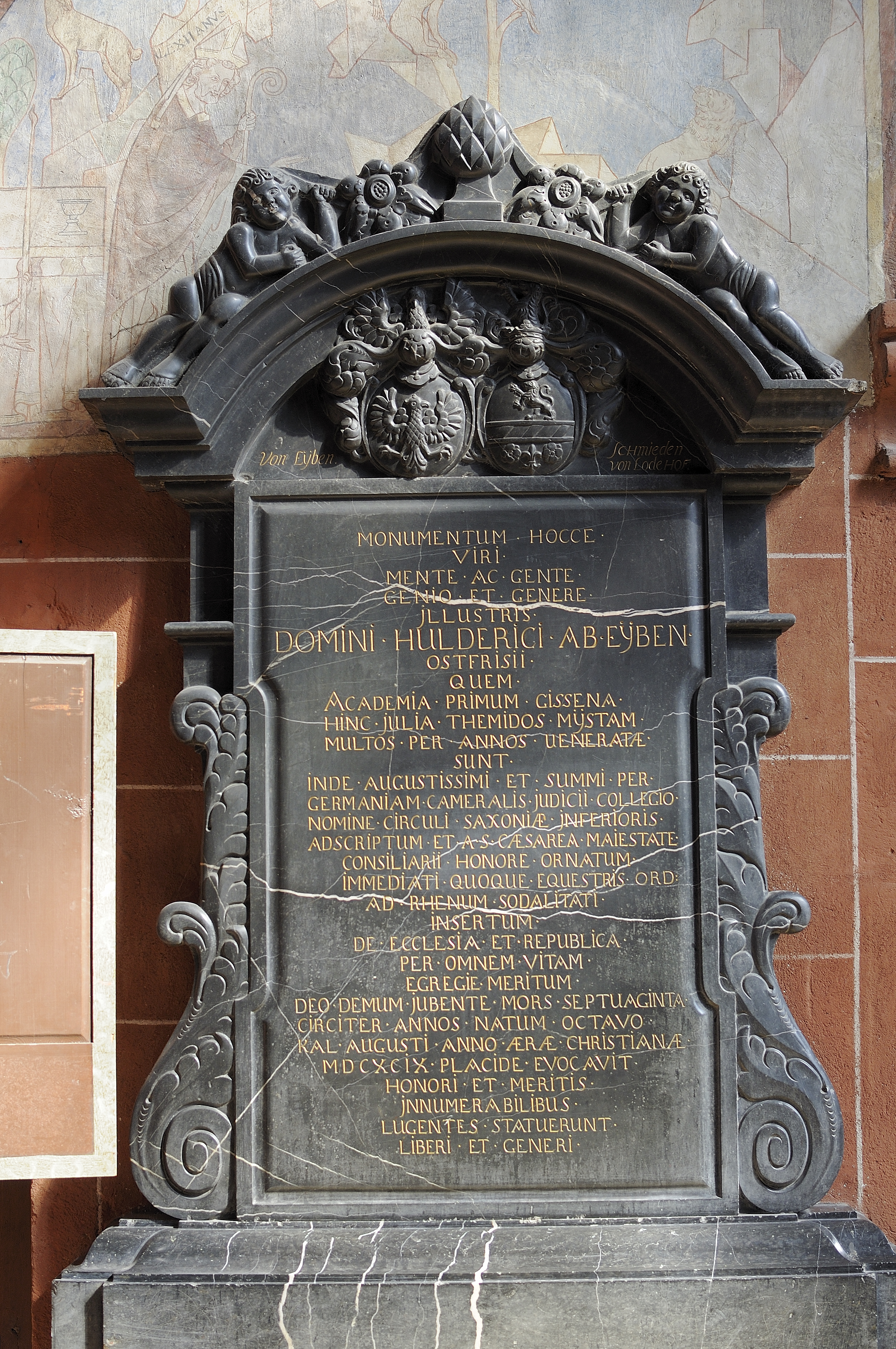 Dieses Foto entstand im Rahmen des Projekts Wiki Loves Monuments Mittelhessen, das aus dem Community-Projektbudget von Wikimedia Deutschland e. V. gefördert wurde.